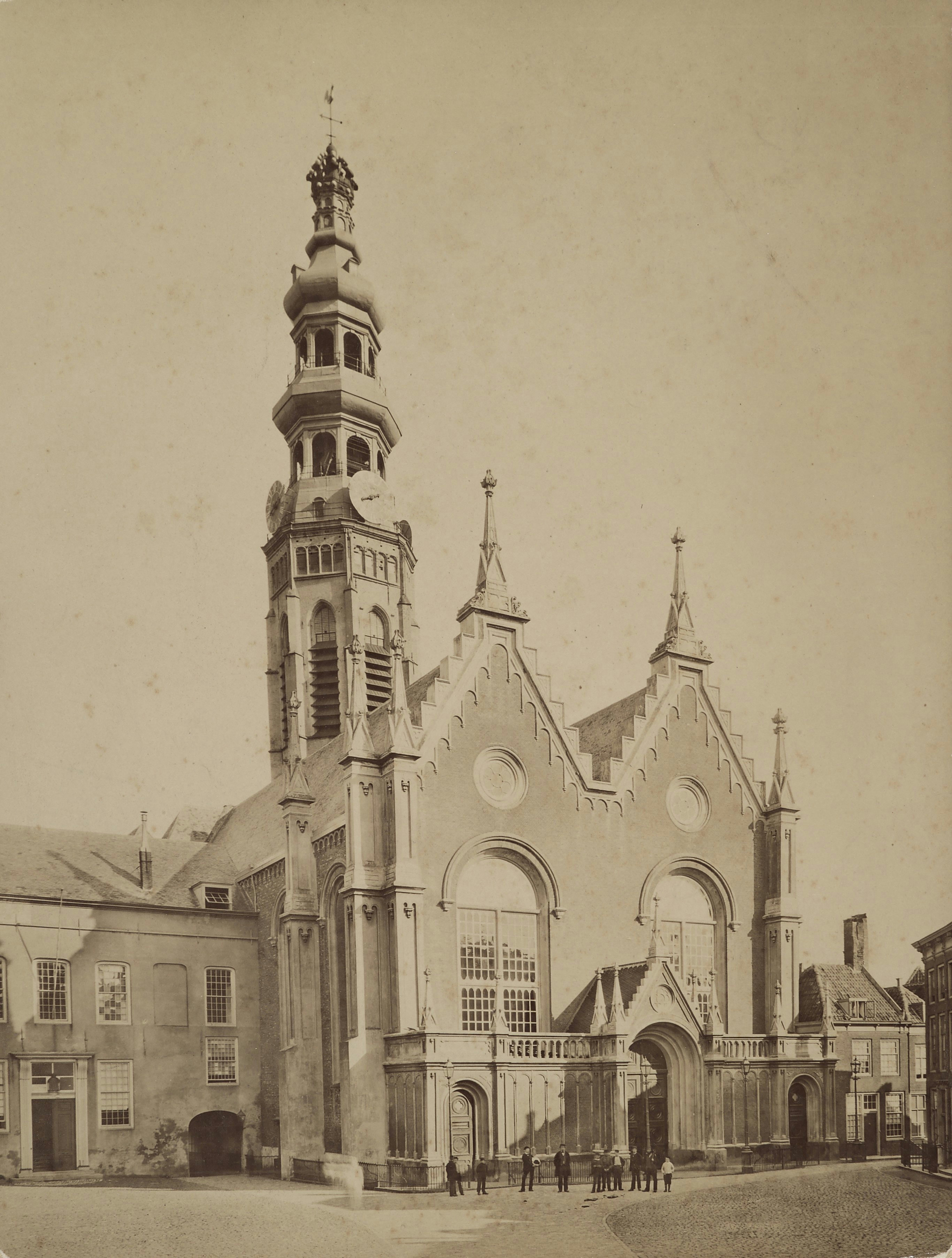 Abdij: Gezicht op Nieuwe kerk en Lange Jan vanuit het noordwesten (opmerking: Zie ook neg 60.210 repro)